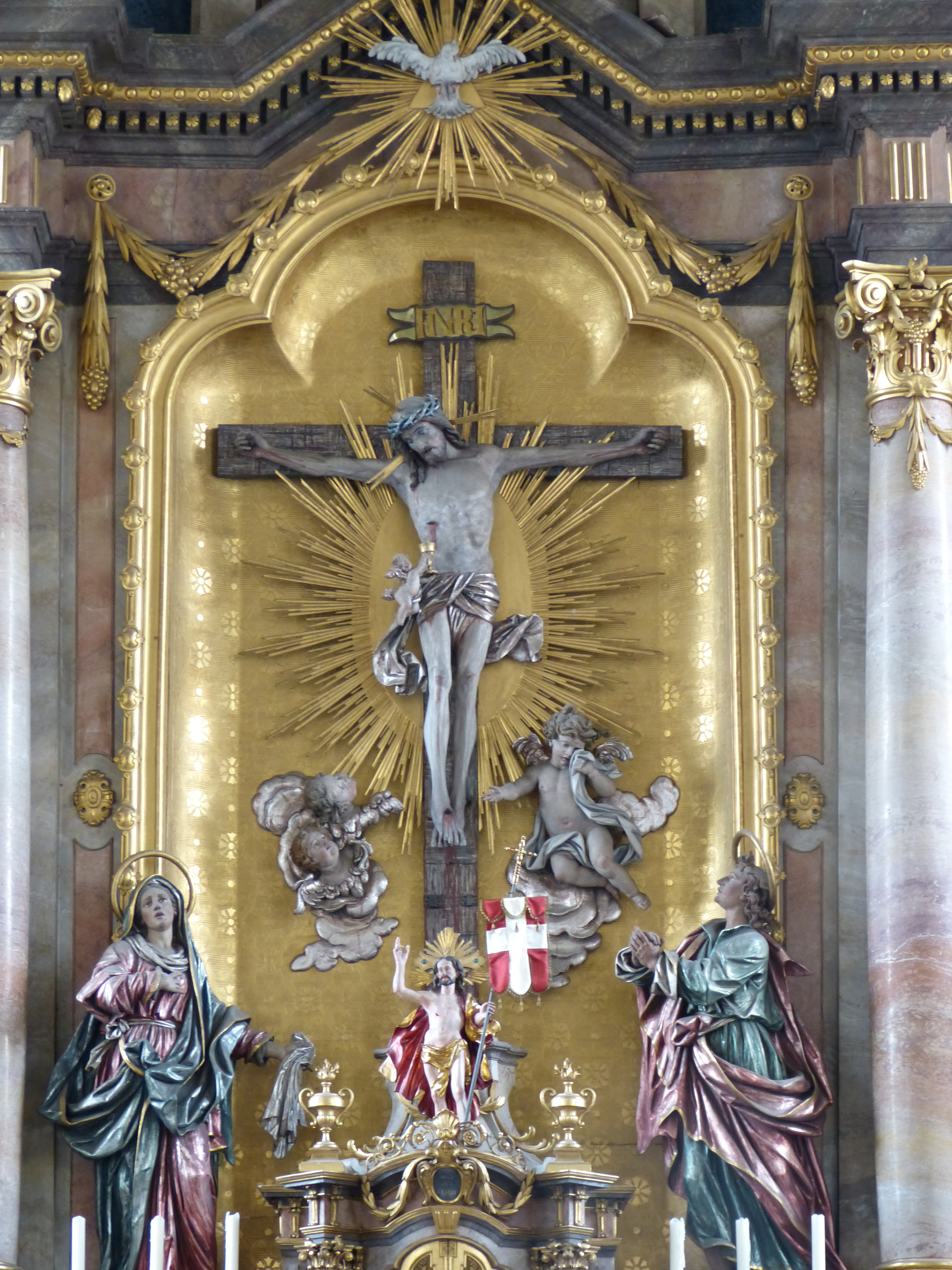 St. Stephan, Pfaffenhausen, Landkreis Unterallgäu, Bayern